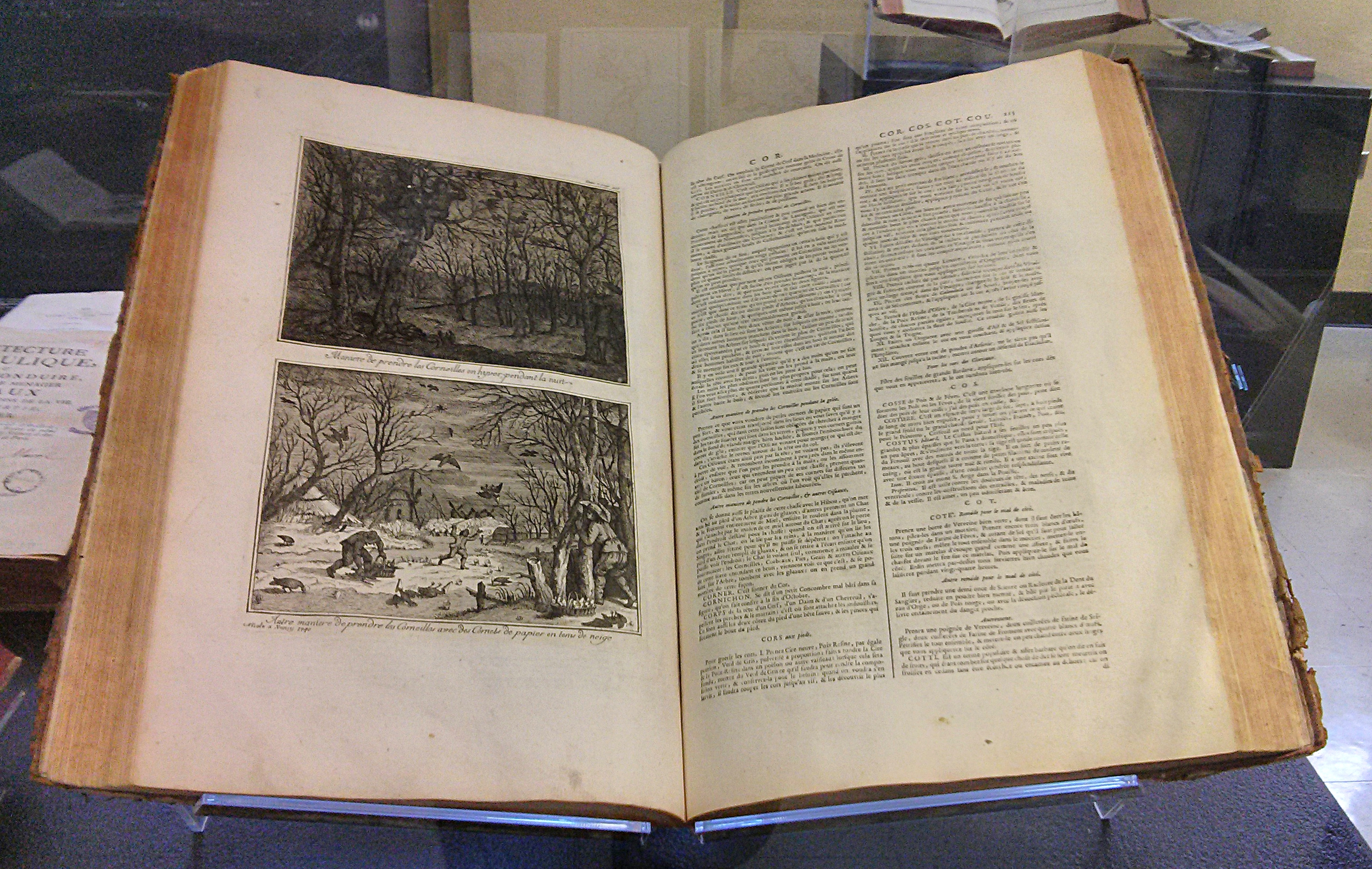 Dictionnaire œconomique : contenant divers moyens d'augmenter son bien, et de conserver sa santé : avec plusieurs remedes assurez et eprouvez pour un très-grand nombre de maladies, & de beaux secrets pour parvenir à une longue & heureuse vieillesse. Par Noël Chomel. Volume I, 1741. 4e éd., rev., corr., & considérablement augm. par divers curieux, et par J. Marret, enrichie de figures nouvellement dessinées & gravées par un disciple de feu B. Picard le Romain. Collection de la Bibliothèque de l'Université Laval.